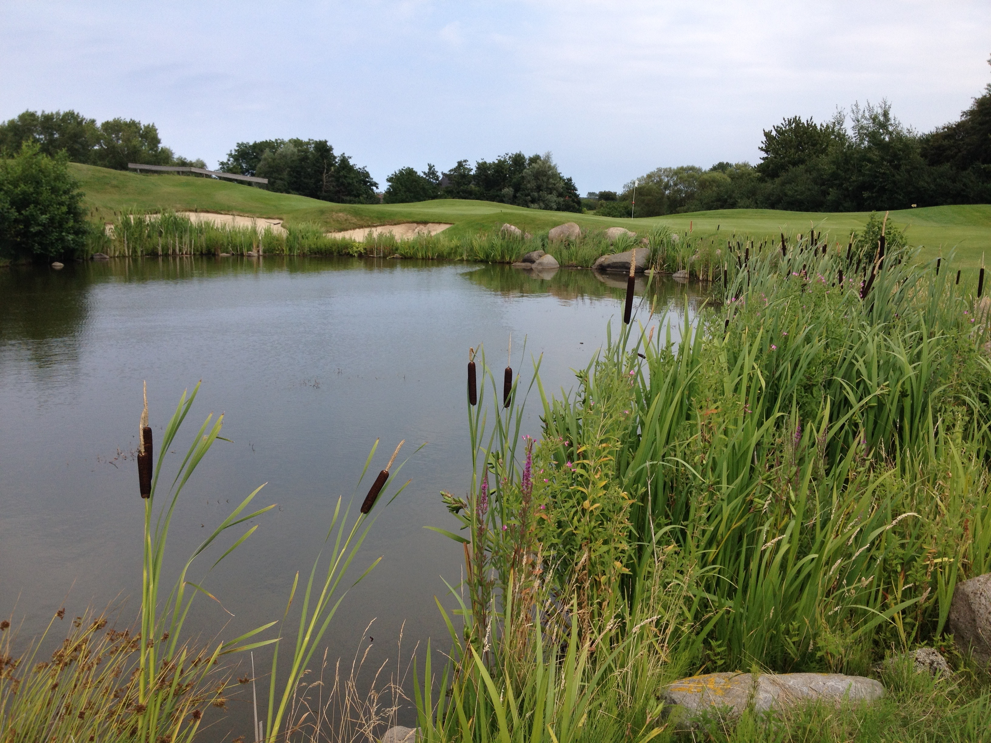 Golfplatz Wittenbeck